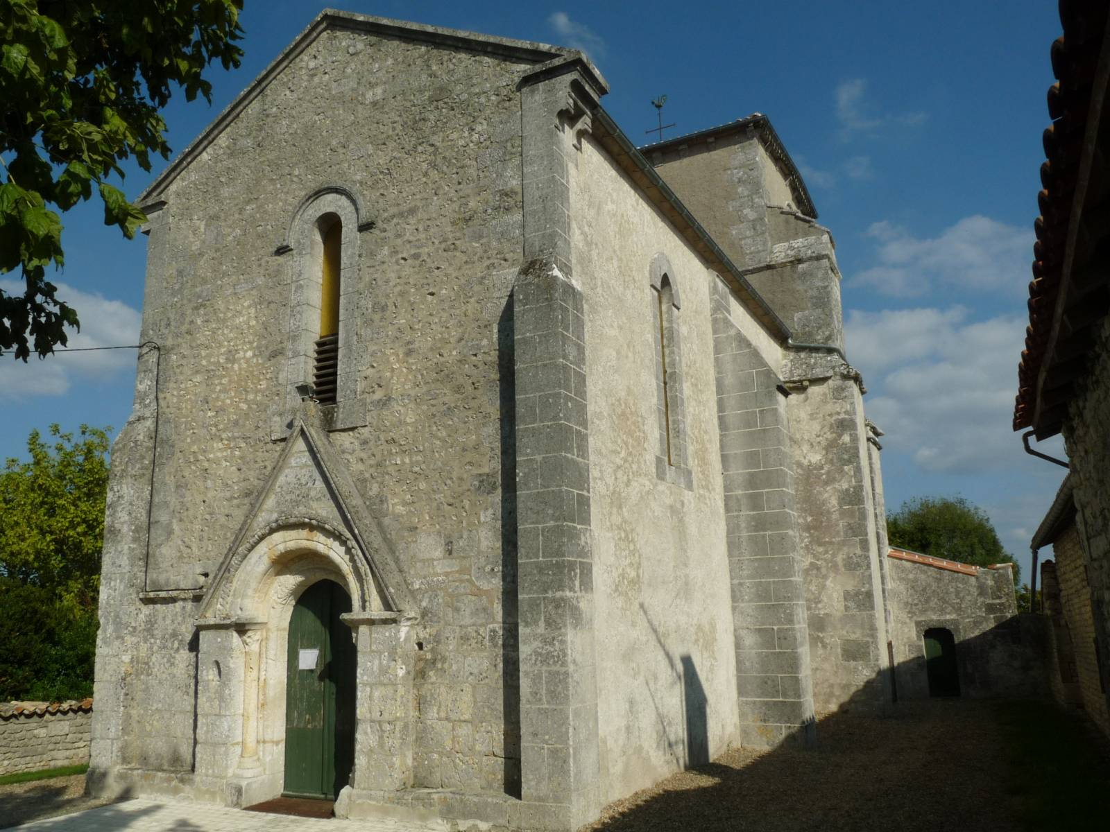 église de Vignolles (16), France